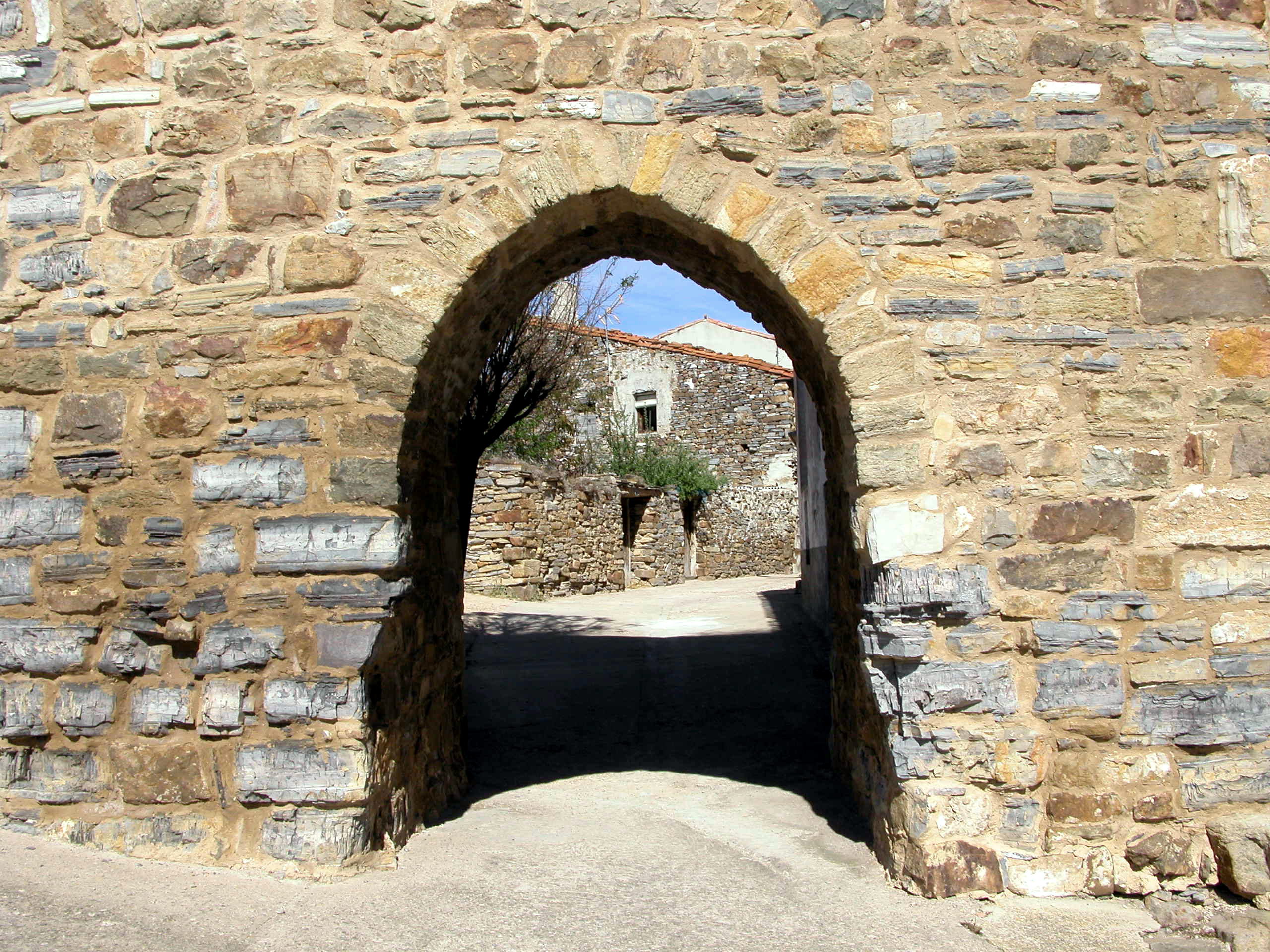 SAN PEDRO MANRIQUE (Tierras Altas de Soria). Puerta de entrada de la antigua muralla.